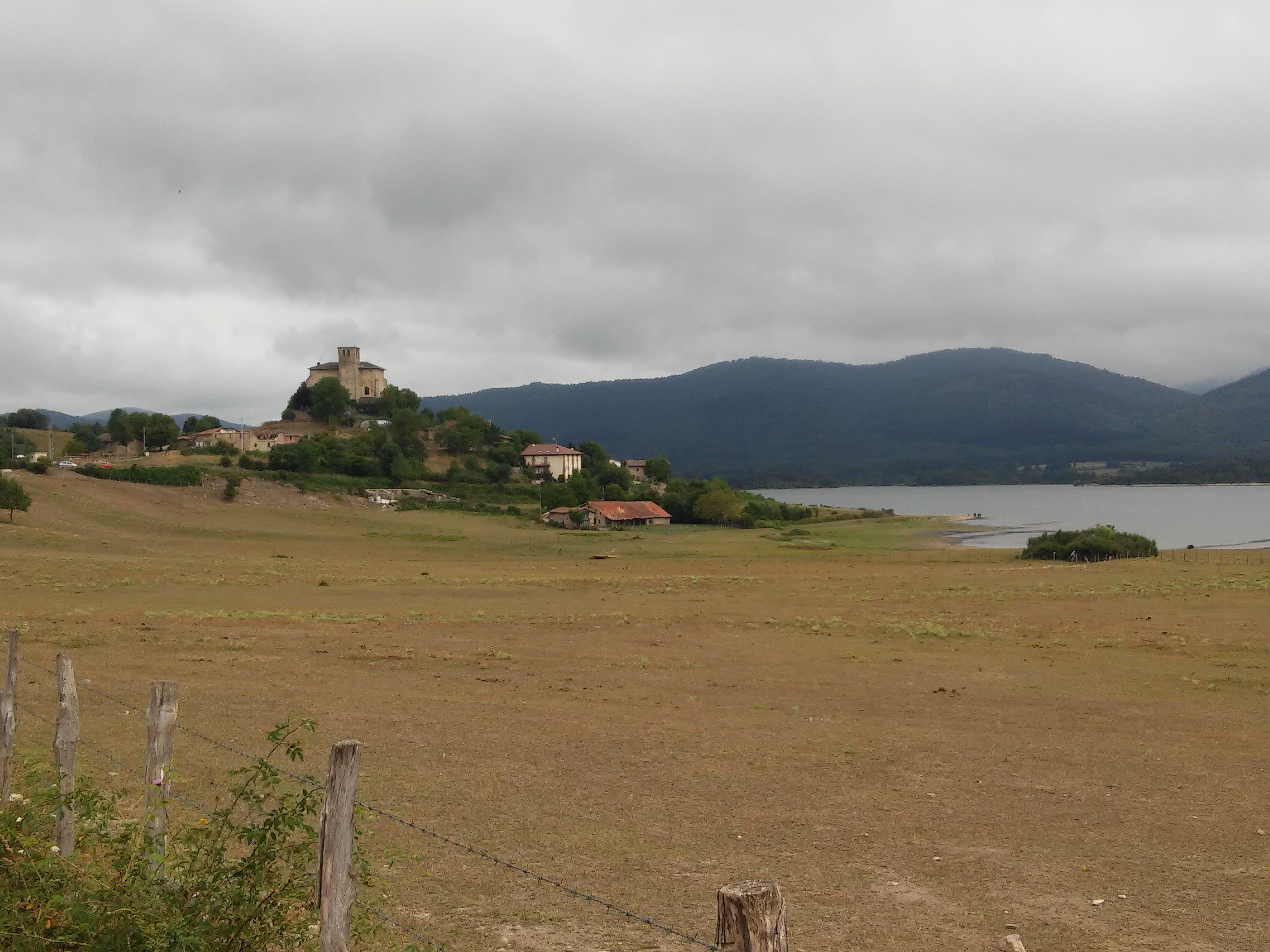 Langara Ganboa (Arratzua-Ubarrundia, Araba) eta Uribarri Ganboako urtegia